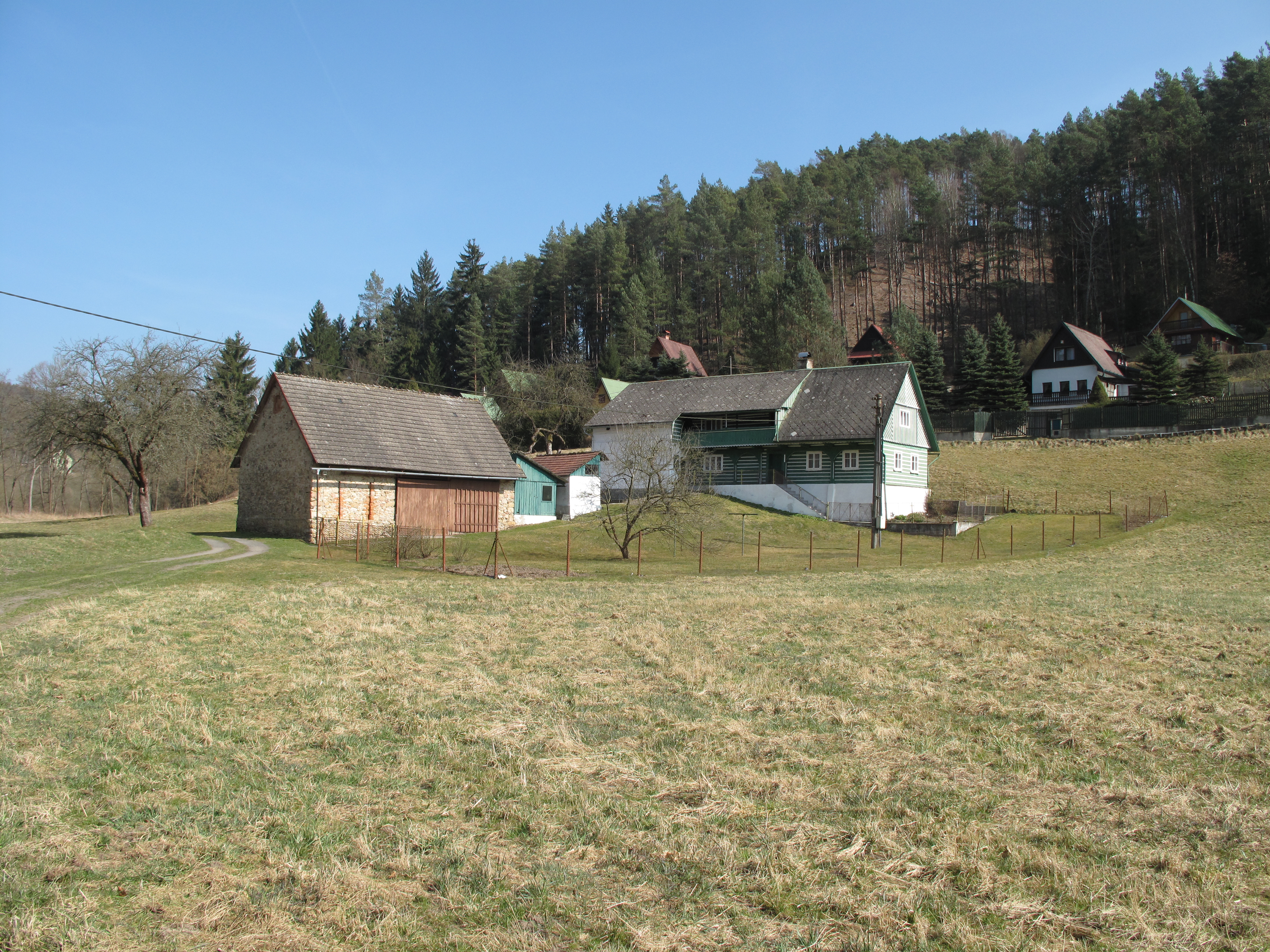 Roubenka v Buřínsku 1. díl. Okres Mladá Boleslav, Česká republika.